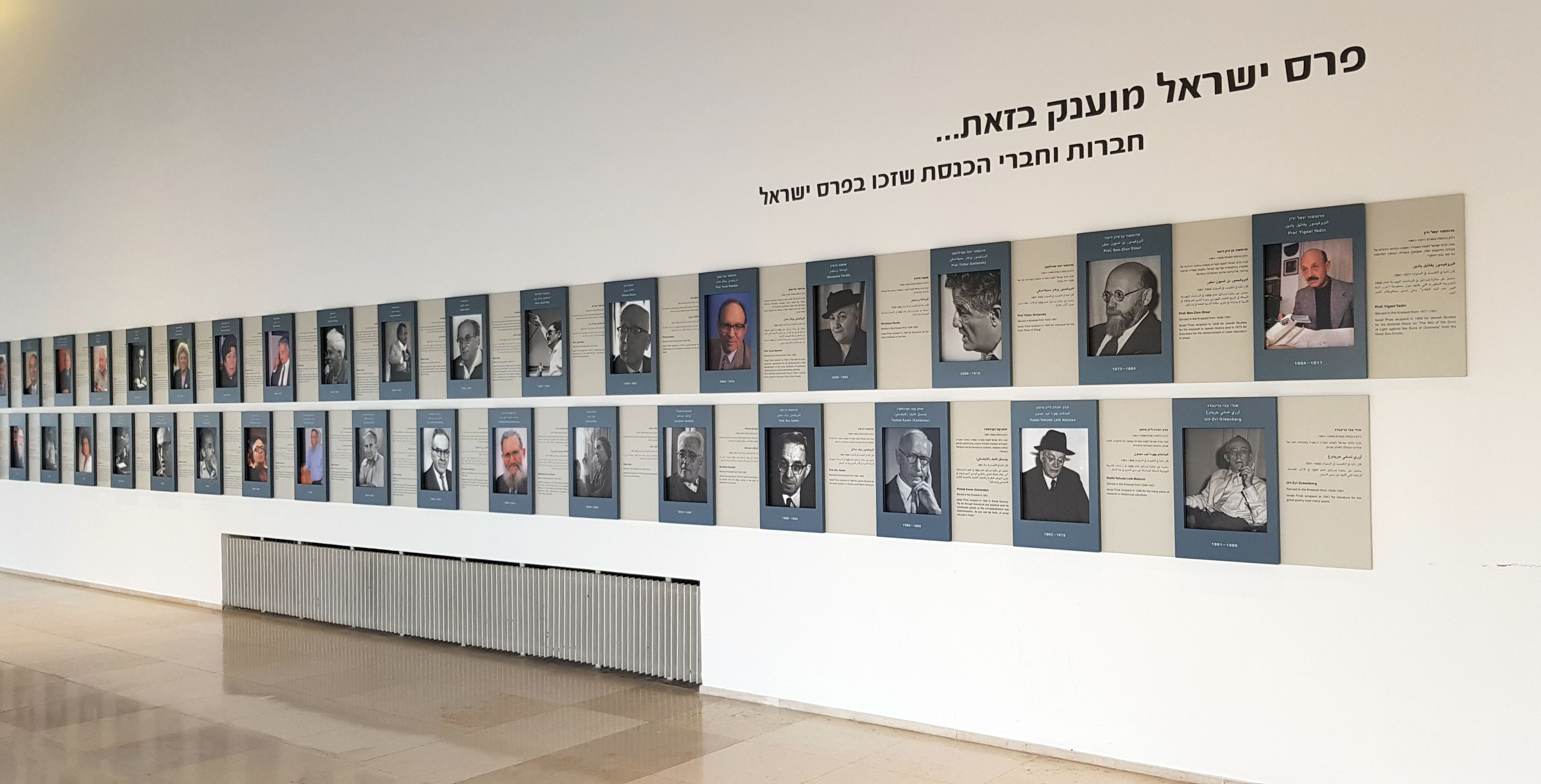 תמונות של חברי הכנסת זוכי פרס ישראל במשכן הכנסת